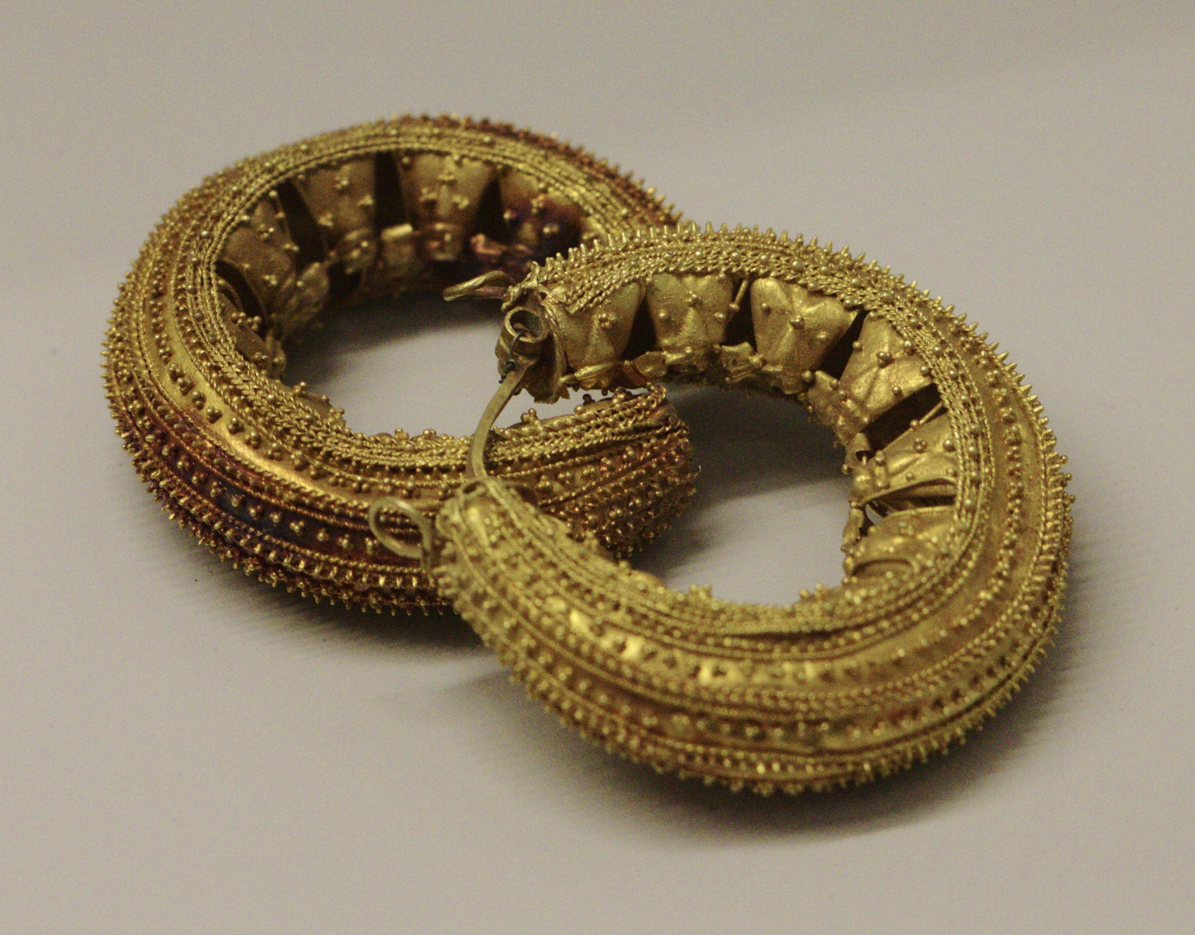 Arracadas barquiformes decoradas con filigrana e granulado, ademais de posibles motivos de "moscas" ou "abellas".